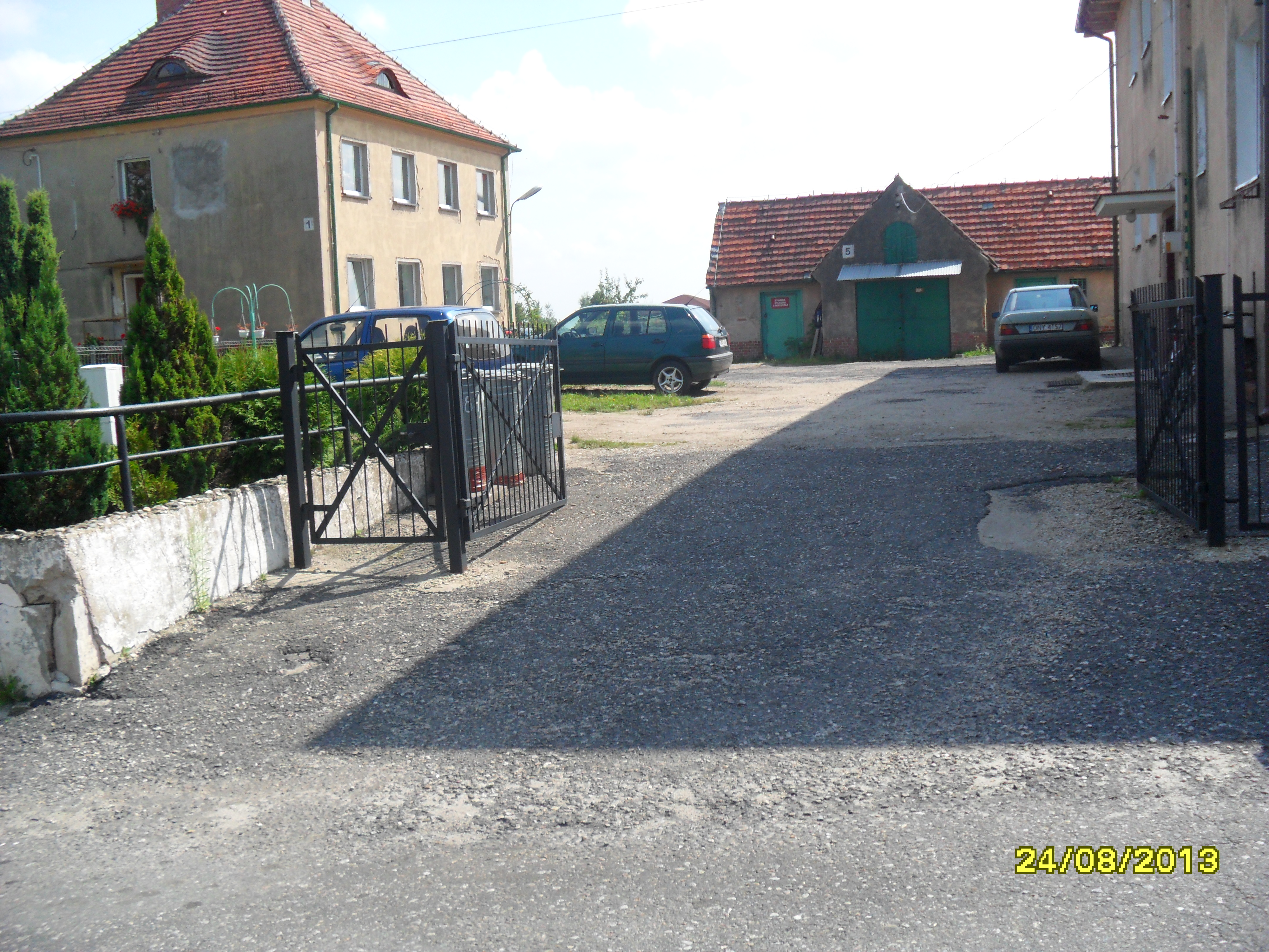 Gościce, budynek byłej Strażnicy Wojsk Ochrony Pogranicza Gościce (WOP), a od 16 maja 1991 roku Strażnica Straży Granicznej w Gościcach (SG). Obecnie budynek mieszkalny — brama wjazdowa